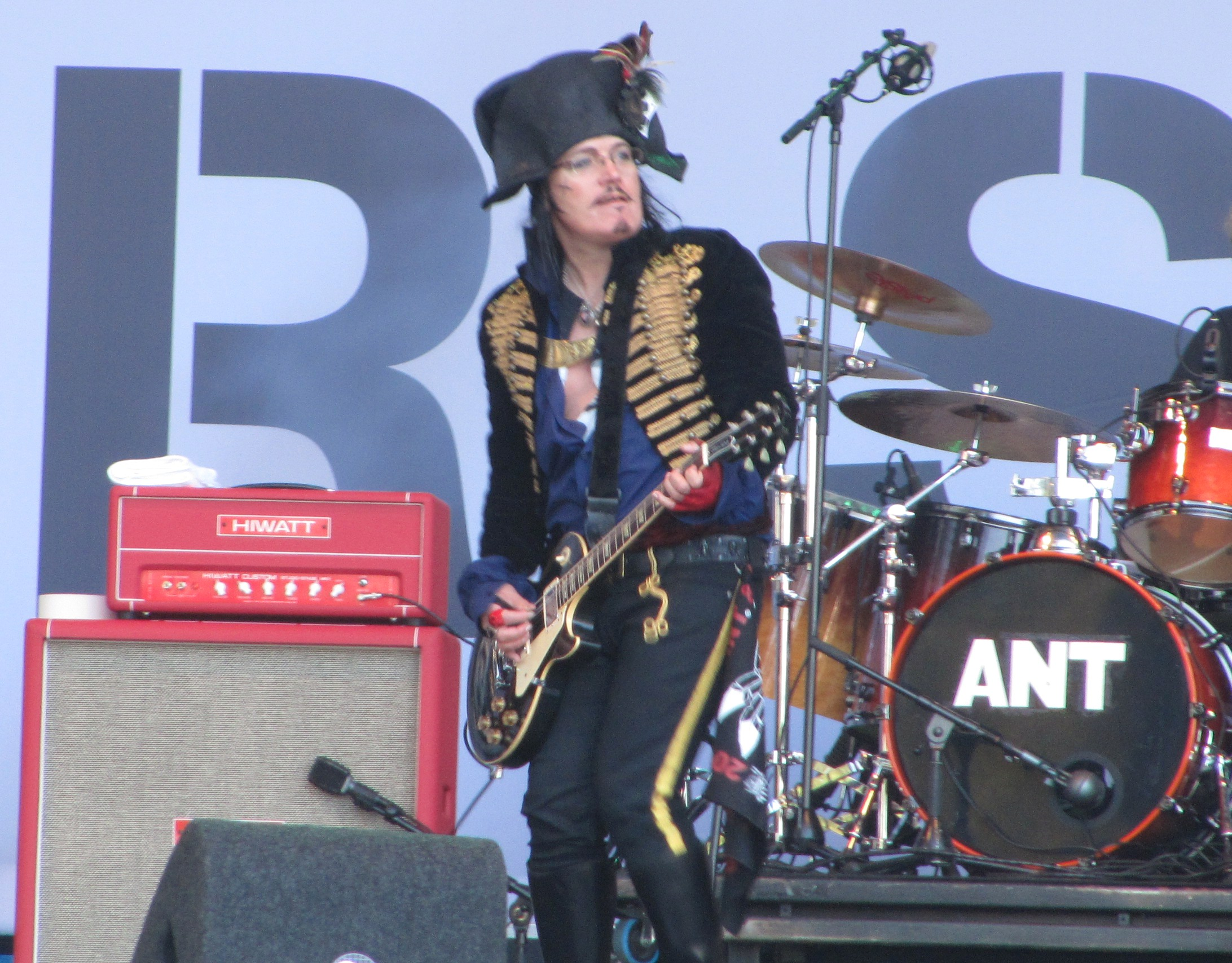 Optreden op Parkpop 2012